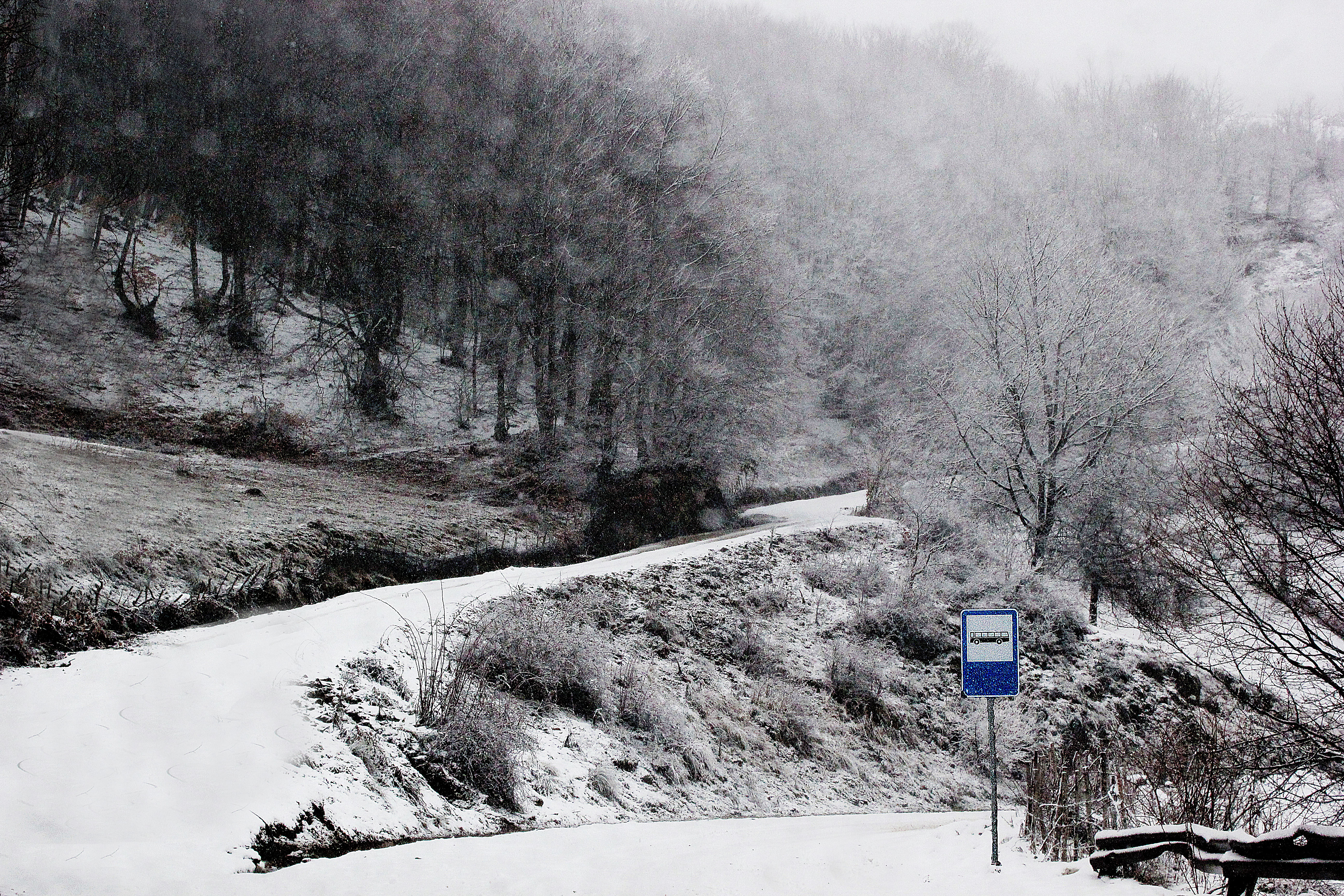 Pamje e rrugës në fshatin Bajgorë.